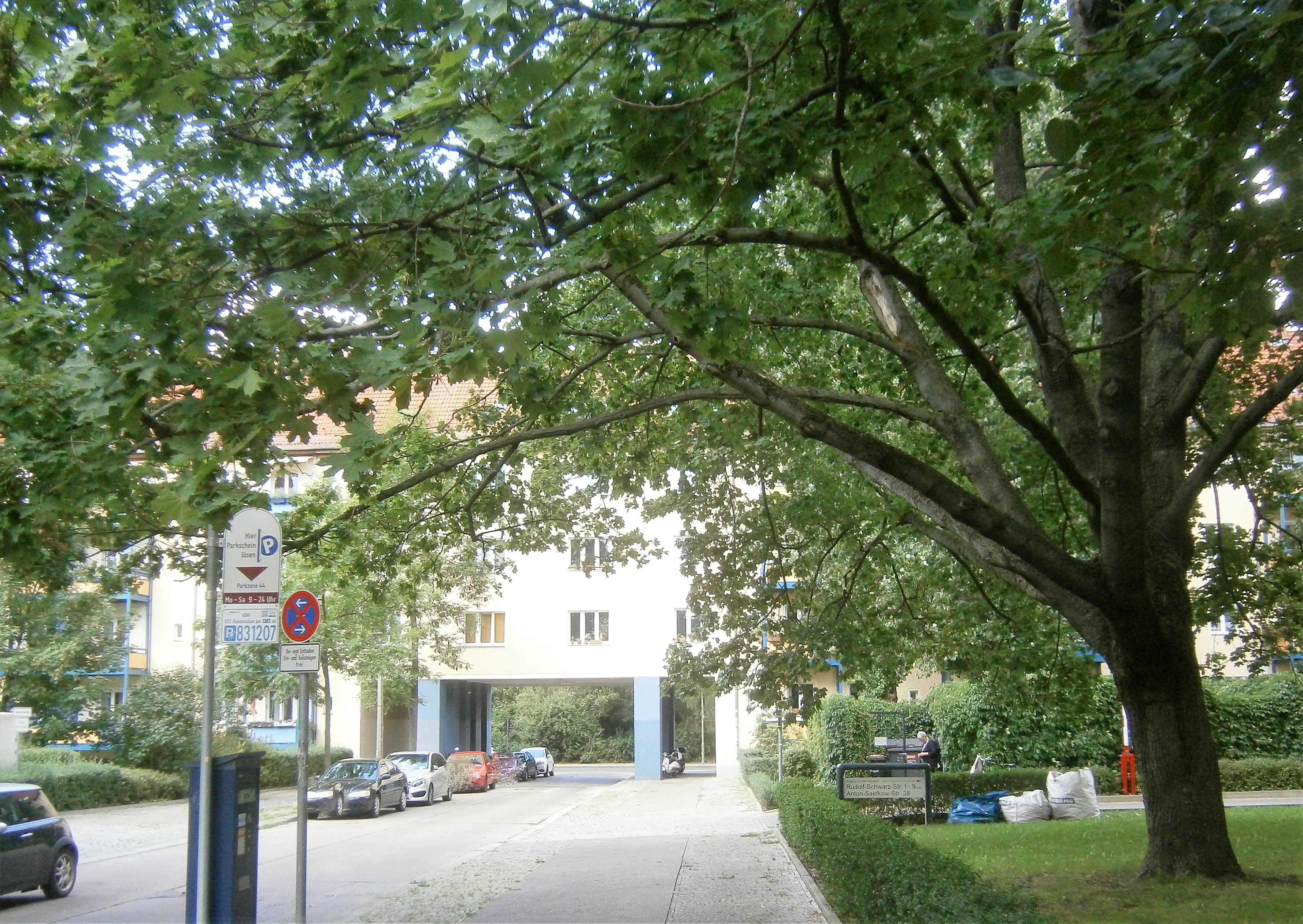 Die Grüne Stadt ist ein 1938/1939 erbautes Wohnensemble und die entsprechende Ortslage im Berliner Ortsteil Prenzlauer Berg des Bezirks Pankow. Im Bild die Durchfahrt durch das Wohnhaus von der Bötzowstraße in die Rudolf-Schwarz-Straße als Straße im Wohnensemble.